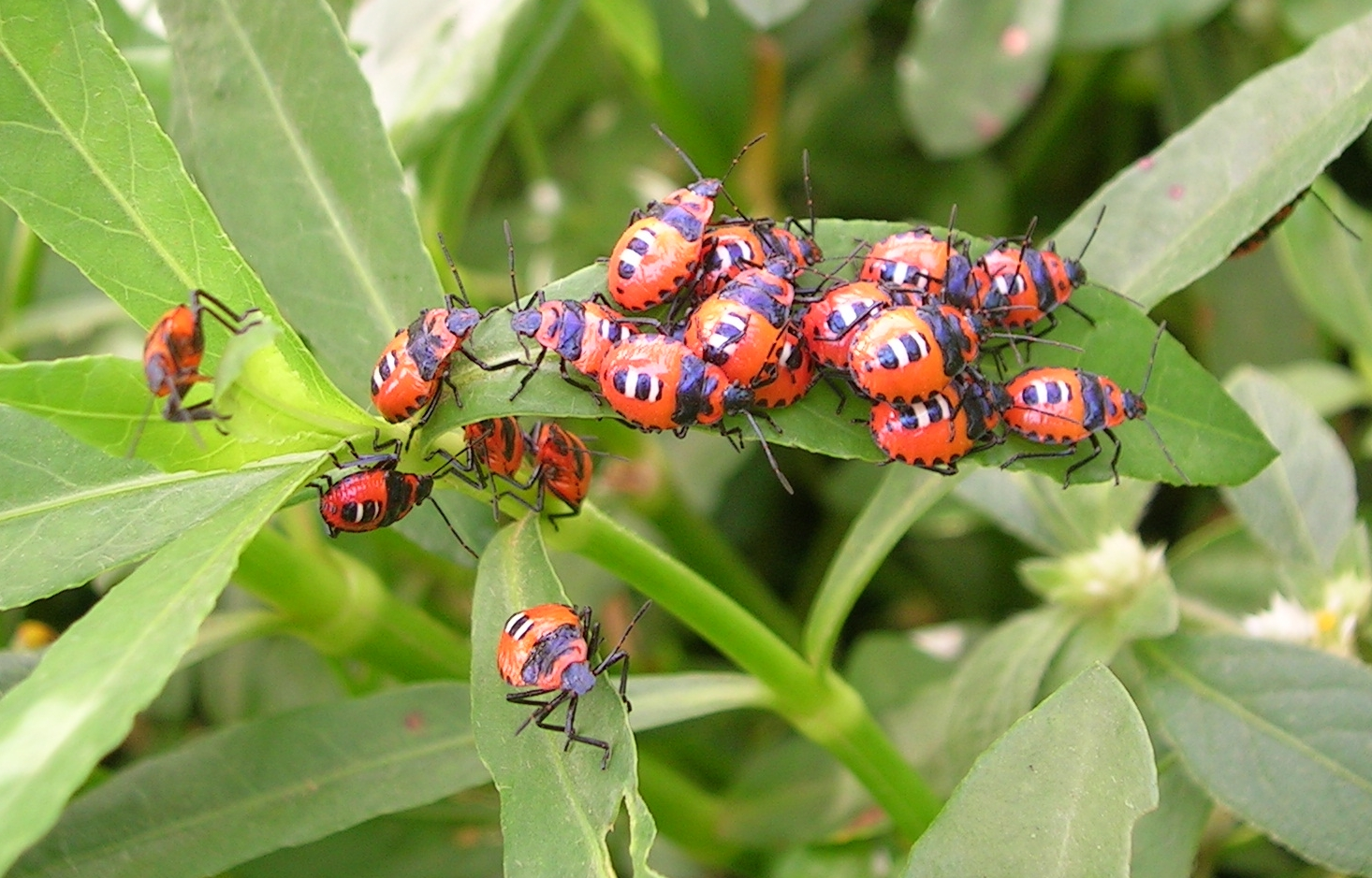 Pentatomid bug nymphs aggregating on a plant in Bangalore, India